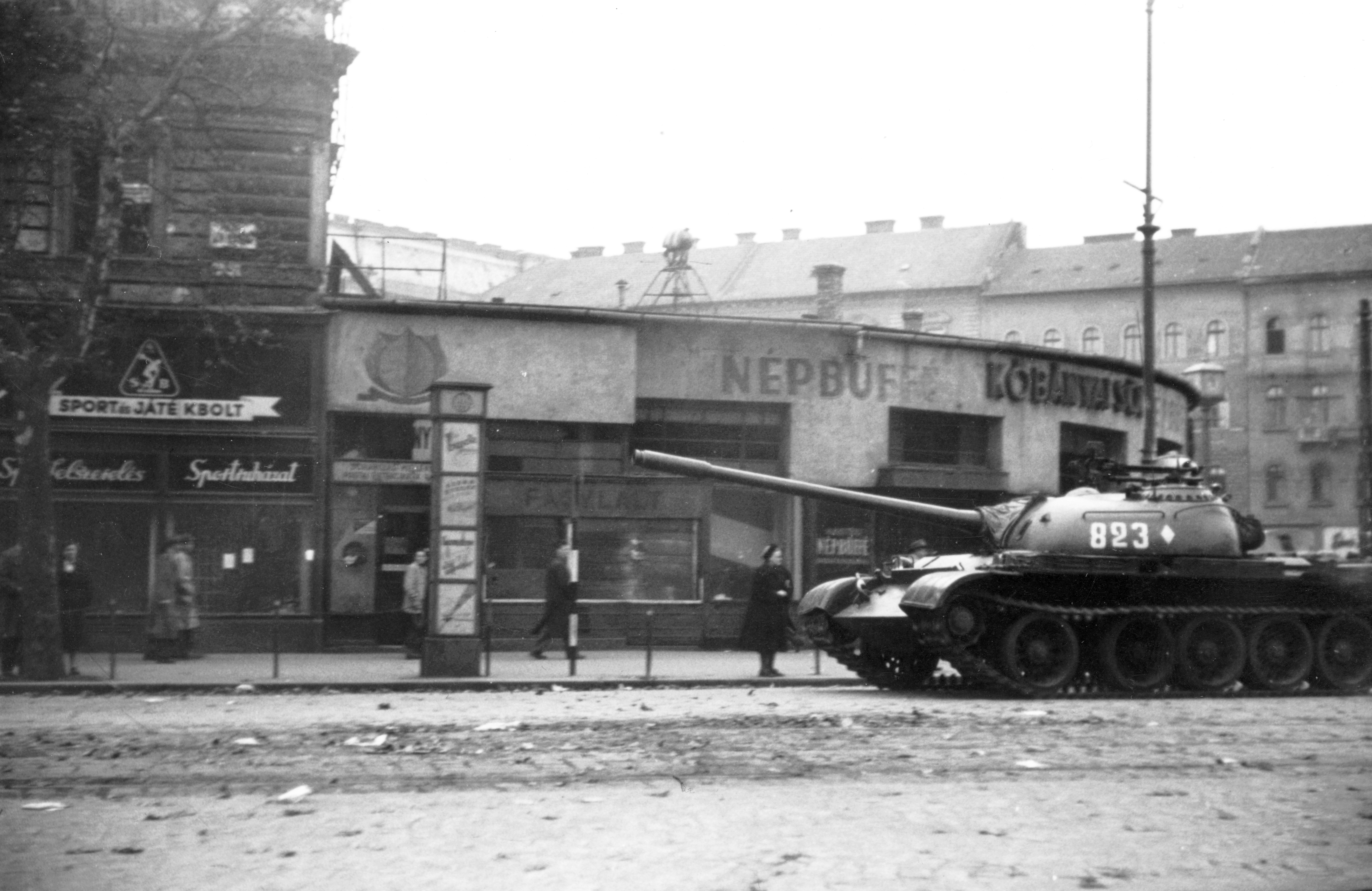 Nyugati (Marx) tér, Népbüfé (Ilkovics). A szovjet csapatok ideiglenes kivonulása 1956. október 31-én. T-54-es harckocsi. Location: Hungary, Budapest Tags: tank, Soviet brand, military, revolution Title: Nyugati (Marx) tér, Népbüfé (Ilkovics). A szovjet csapatok ideiglenes kivonulása 1956. október 31-én. T-54-es harckocsi.